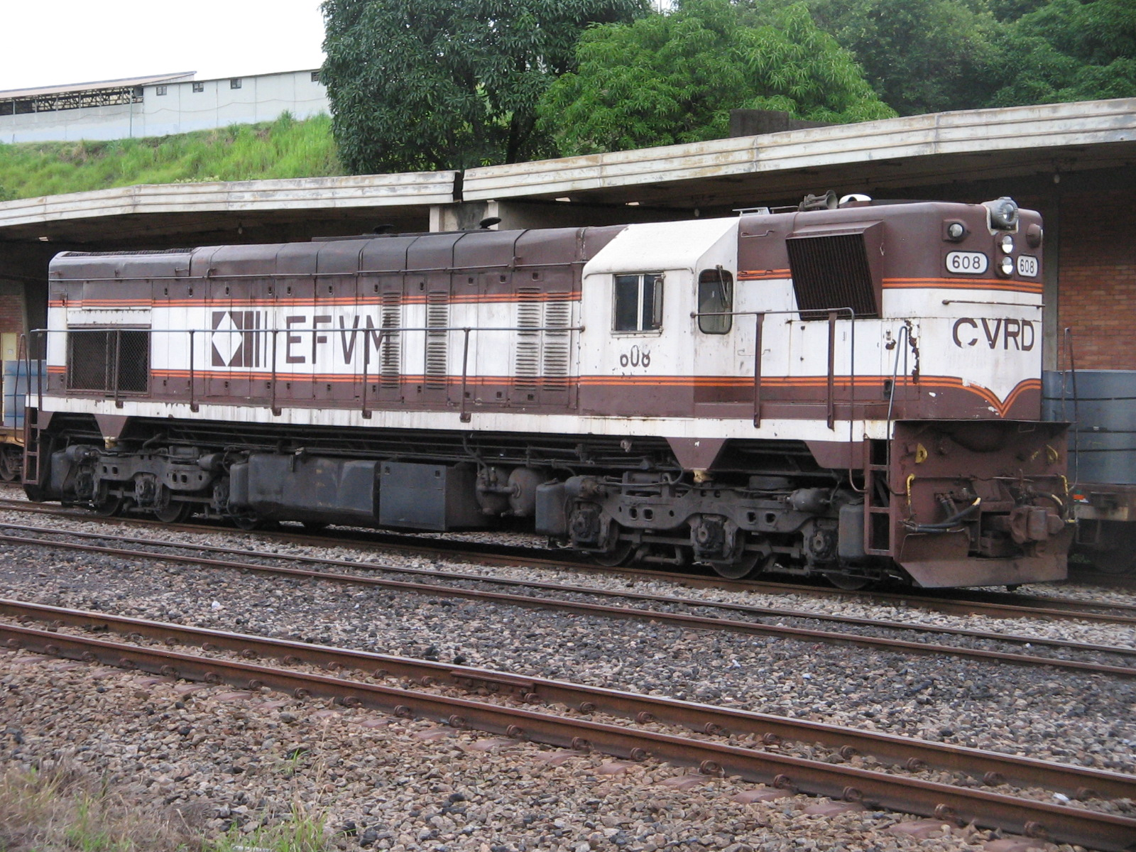 G16 EFVM nº608 - Estacão de Mário Carvalho / Timóteo-MG-Brasil